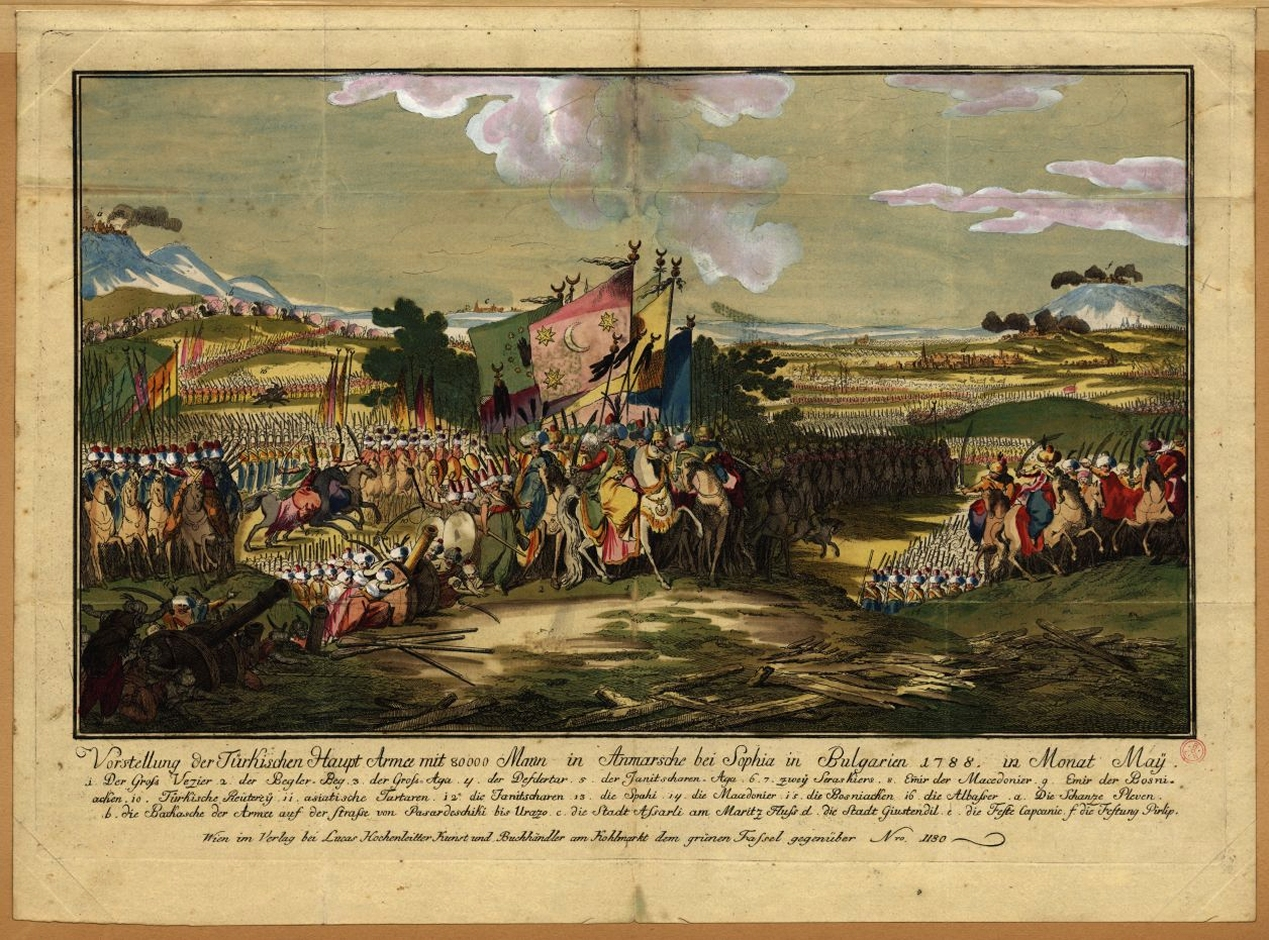 Vorstellung der Türkischen Haupt Armee mit 80.000 Mann in Anmarsche bei Sophia in Bulgarien 1788, in Monat May